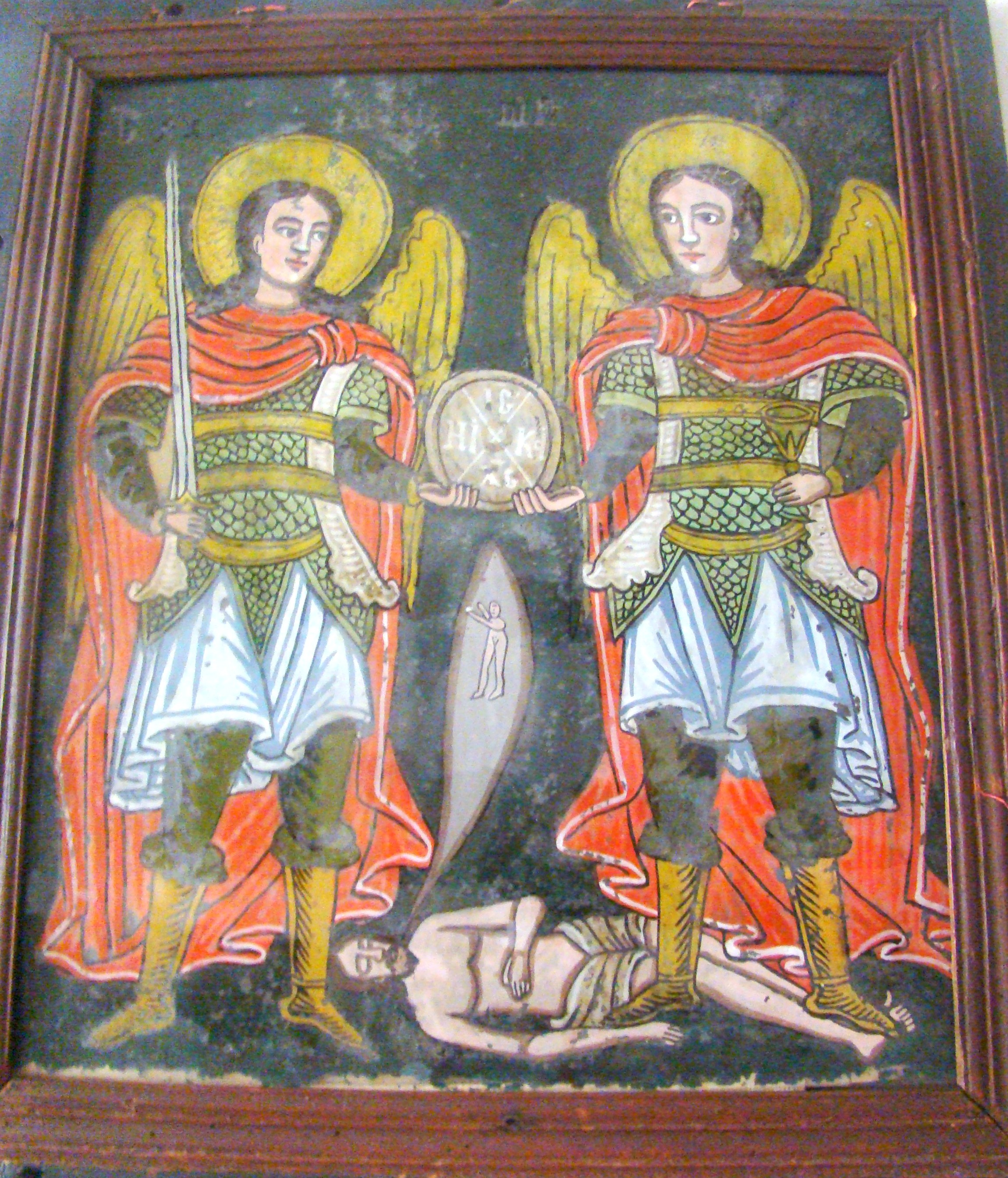 Muzeul de icoane pe sticlă „Pr.Zosim Oancea” din Sibiel